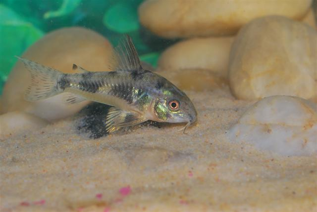 Corydoras paleatus